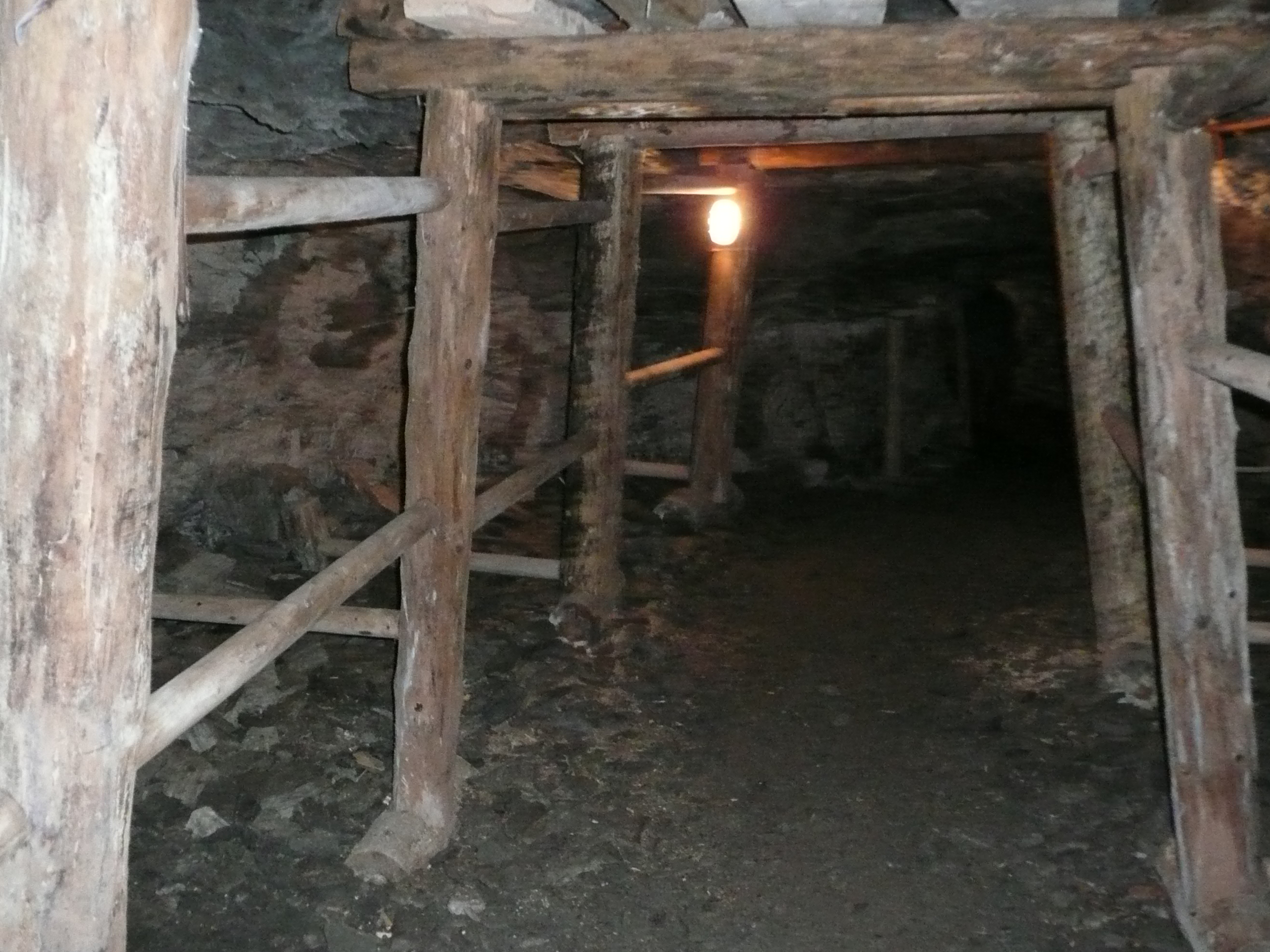 Stollen im Gipsmuseum Schleitheim, Kanton Schaffhausen/Schweiz.